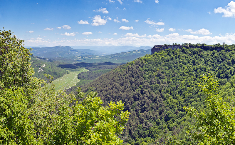 Гора останец «Мангуп-Кале»